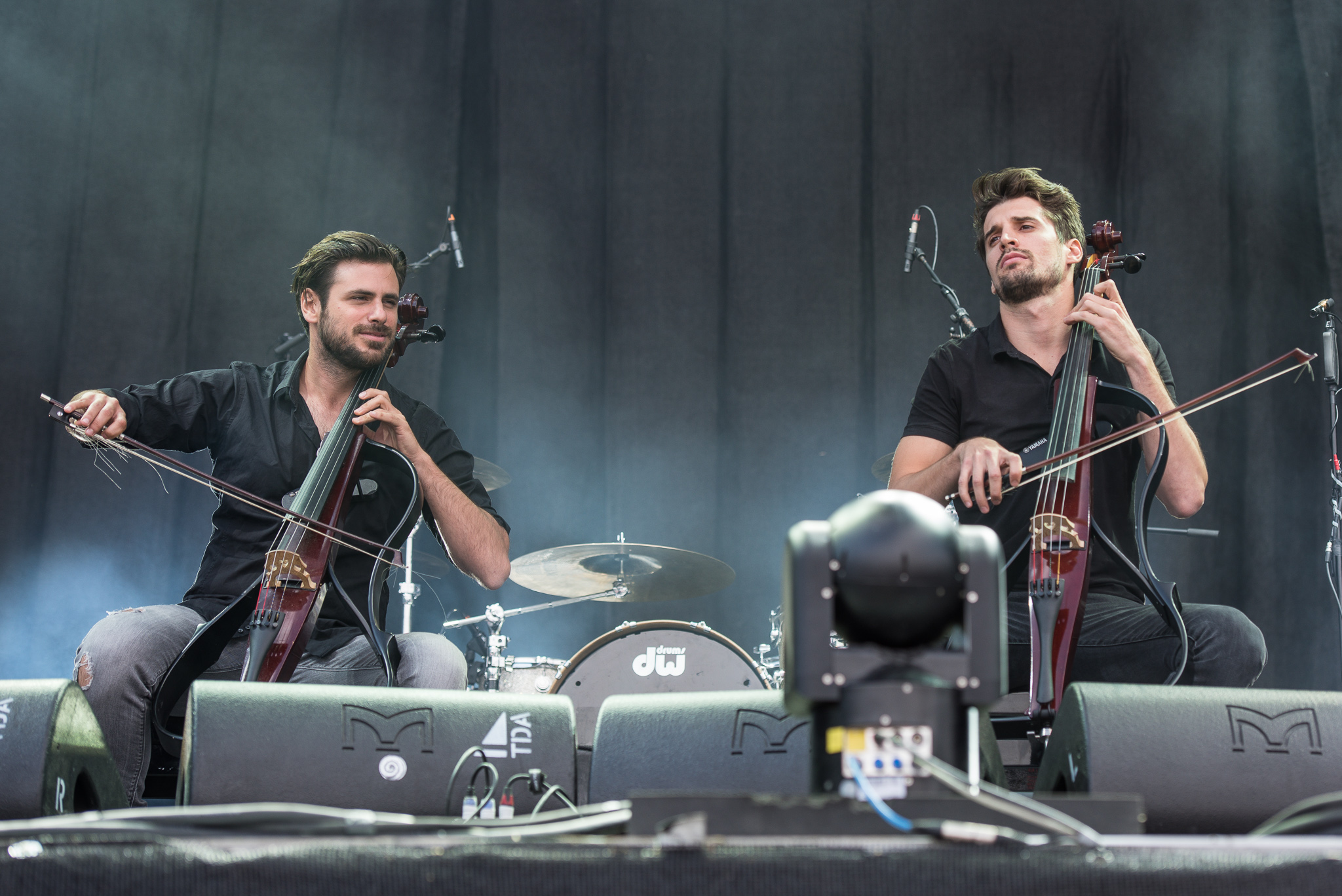 2Cellos,ARGO-Konzerte,Beck's Park Stage,Konzert,Livekonzert,Livemusik,Luka Šulic,Musik,RiP,Rock im Park 2017,Stjepan Hauser